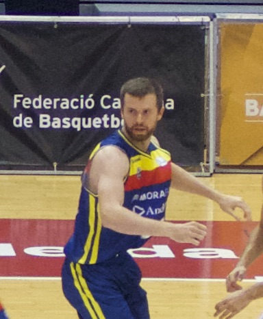 John Shurna, jugador del Morabanc Andorra, en el partit de semifinals de la Lliga catalana 2018-19 davant el Divina Seguros Joventut.